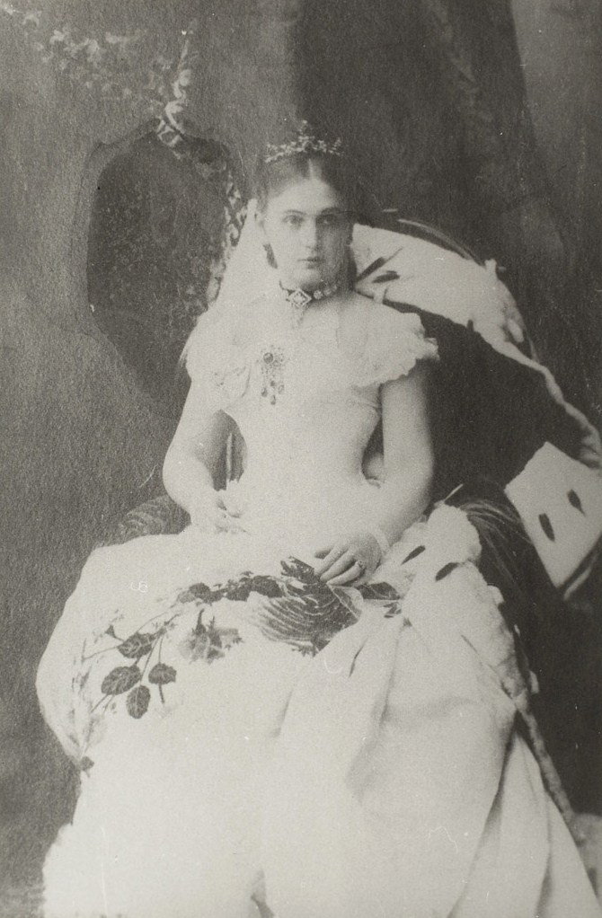 Вера Александровна Волконская, ур. Львова (1848—1924)